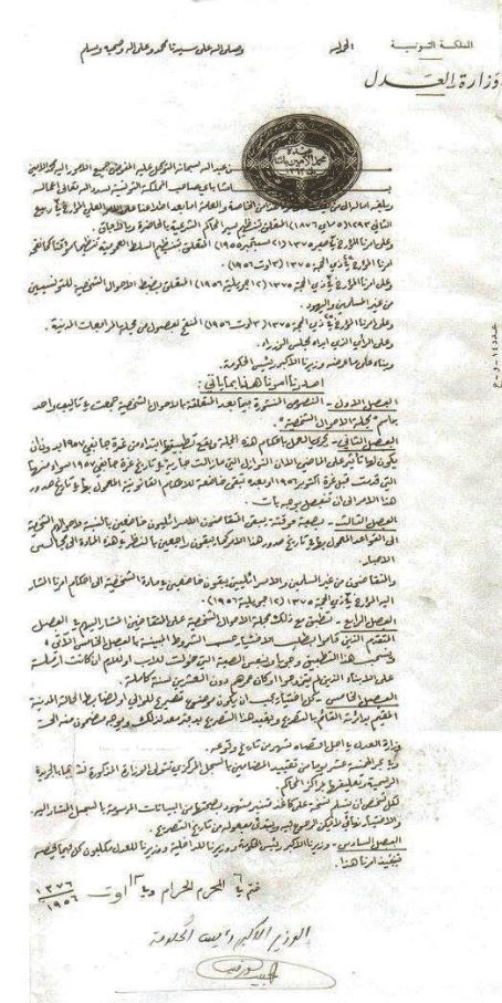 Le document officiel du Code du Status Personnel tunisien promulgué le 13 aout 1956 et signé par le chef du gouvernement Habib Bourguiba.